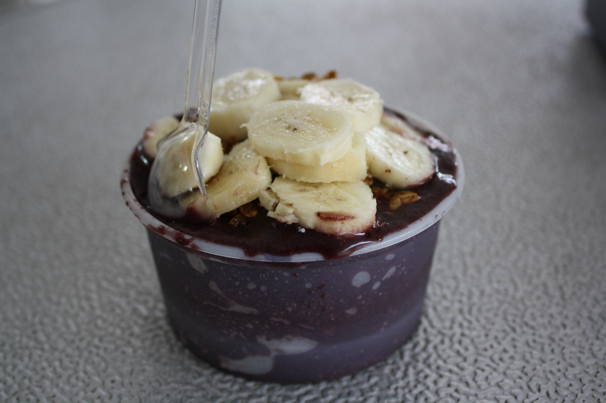 Açaí na tigela